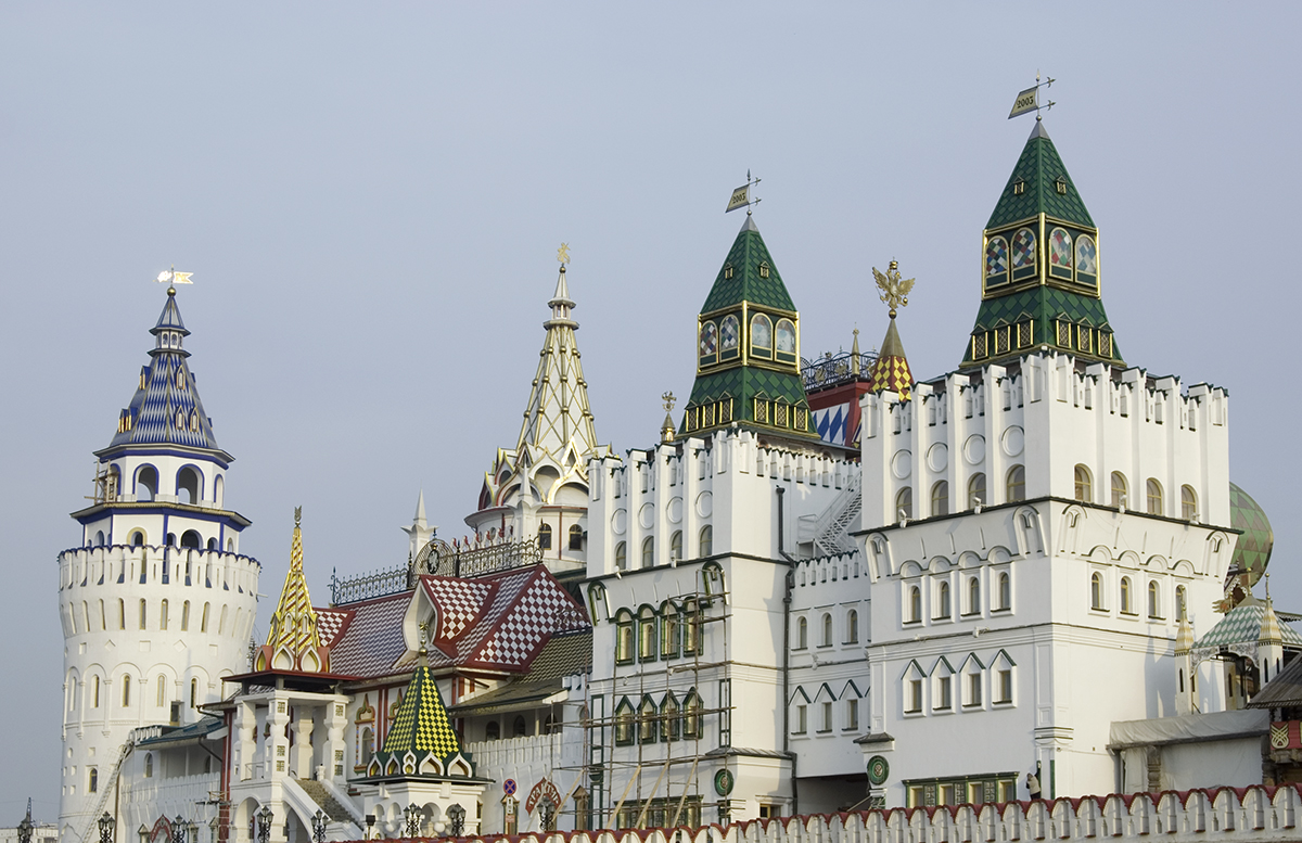 Kremlin